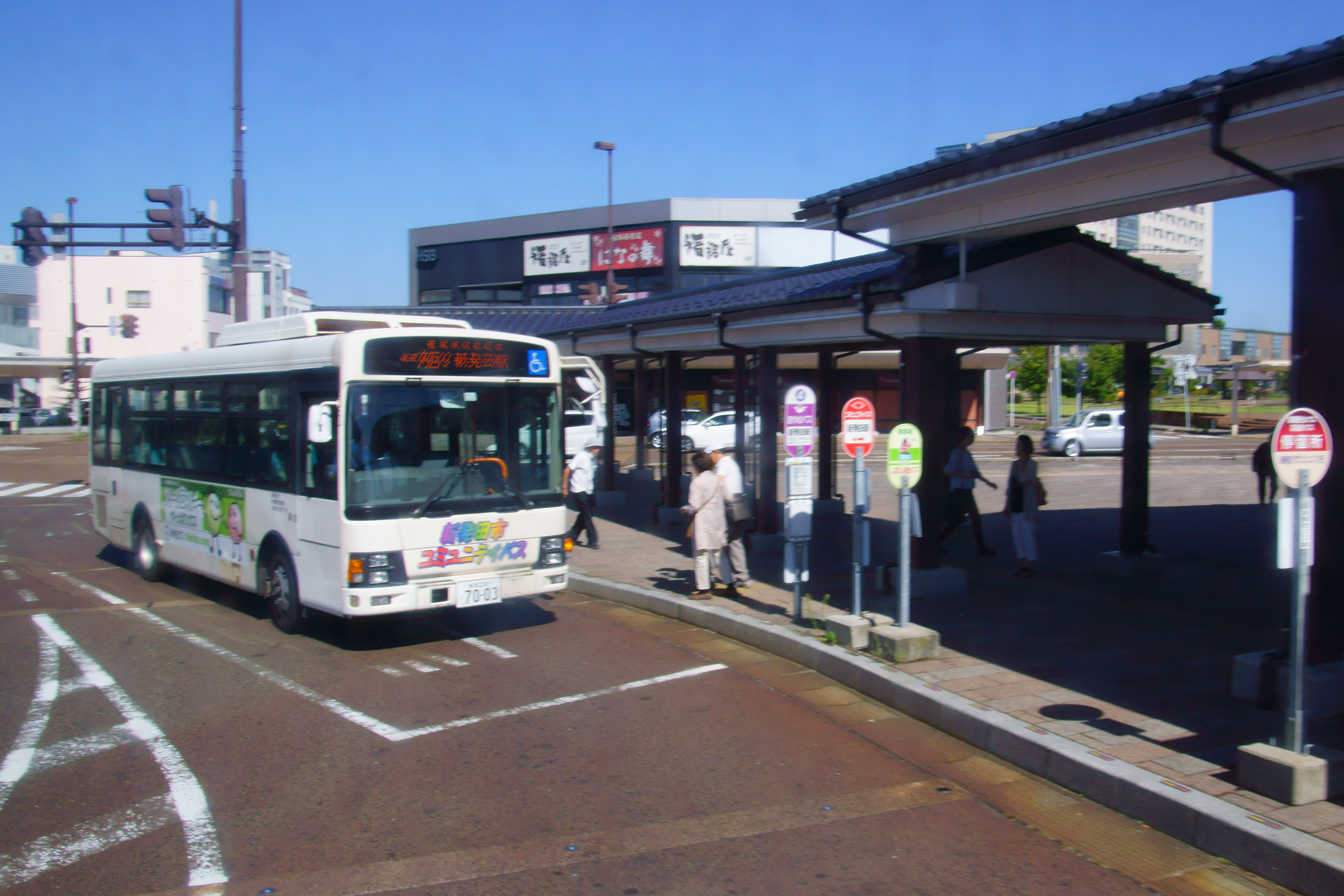 新発田駅に到着する新発田市コミュニティバス車両（2017年9月）